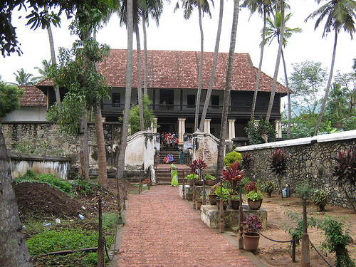 Nagercovil, Tamil Nadu, India.